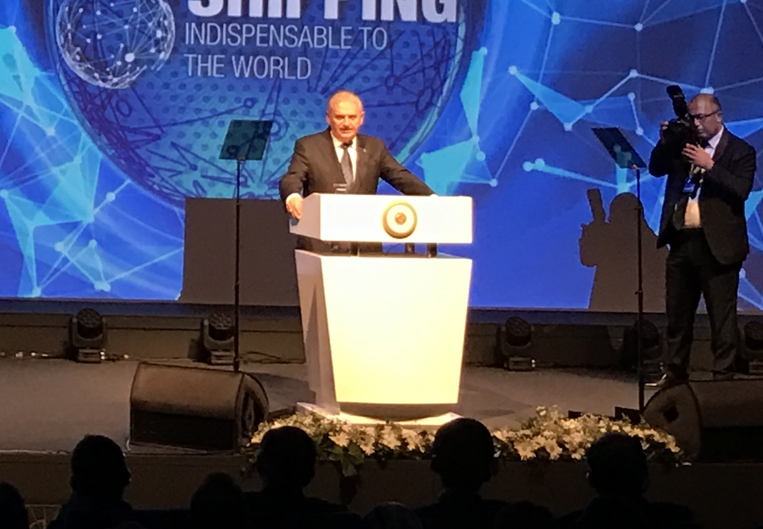 Binali Yıldırım, Uluslararası Denizcilik Organizasyonu'nun (International Maritime Organization) düzenlediği bir etkinlikte konuşma yaparken.